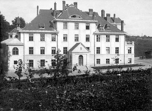 Główna Szkoła Gospodarczą Żeńską (1925-1935), Prywatna Szkoła Gospodarcza Żeńska (1935-1938), Prywatny Instytut Gospodarczego Kształcenia Kobiet im. Janiny Karłowicz (1938-1939)